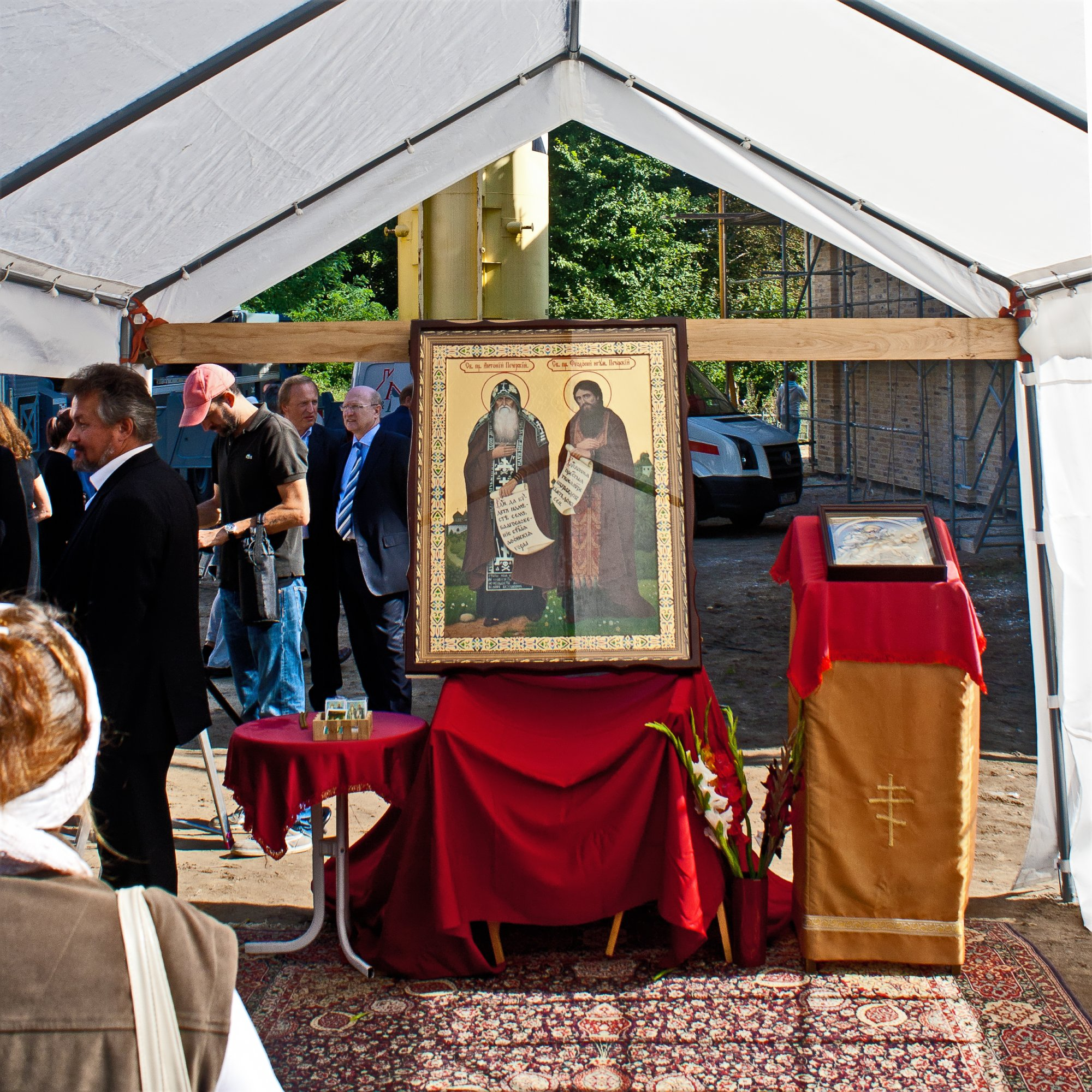 Георгиевский монастырь (Гётшендорф) -Иконка